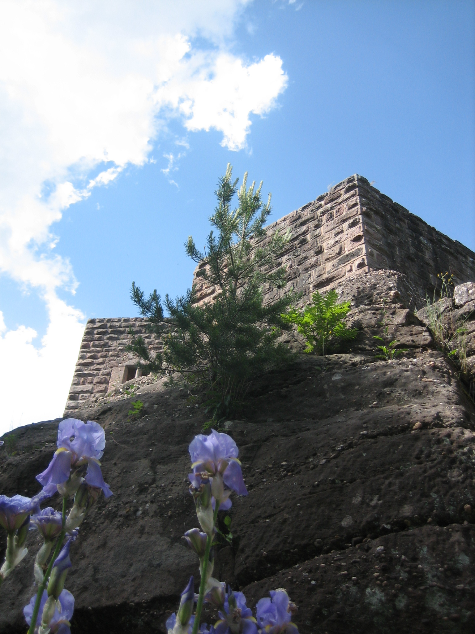 Château du Birkenfels dans la forêt d'Obernai (France)